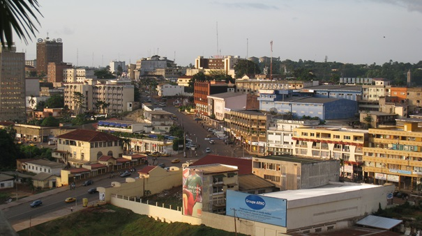 vue partielle du centre ville de yaounde la capitale du cameroun photo prise dans une chambre d hotel